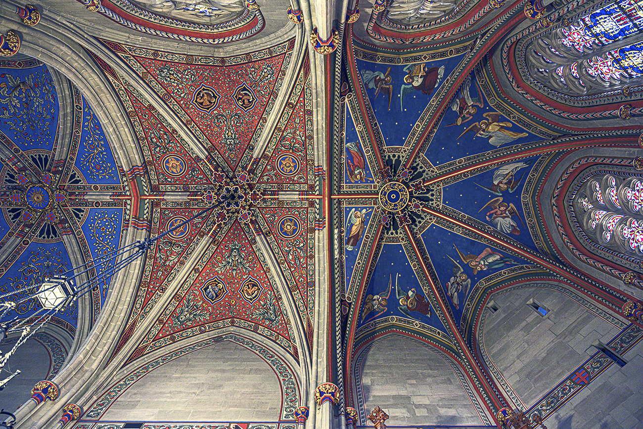 Makkabäer-Kapelle der Kathedrale St. Peter in Genf, Schweiz (Decke über Chor und Mittelgang)